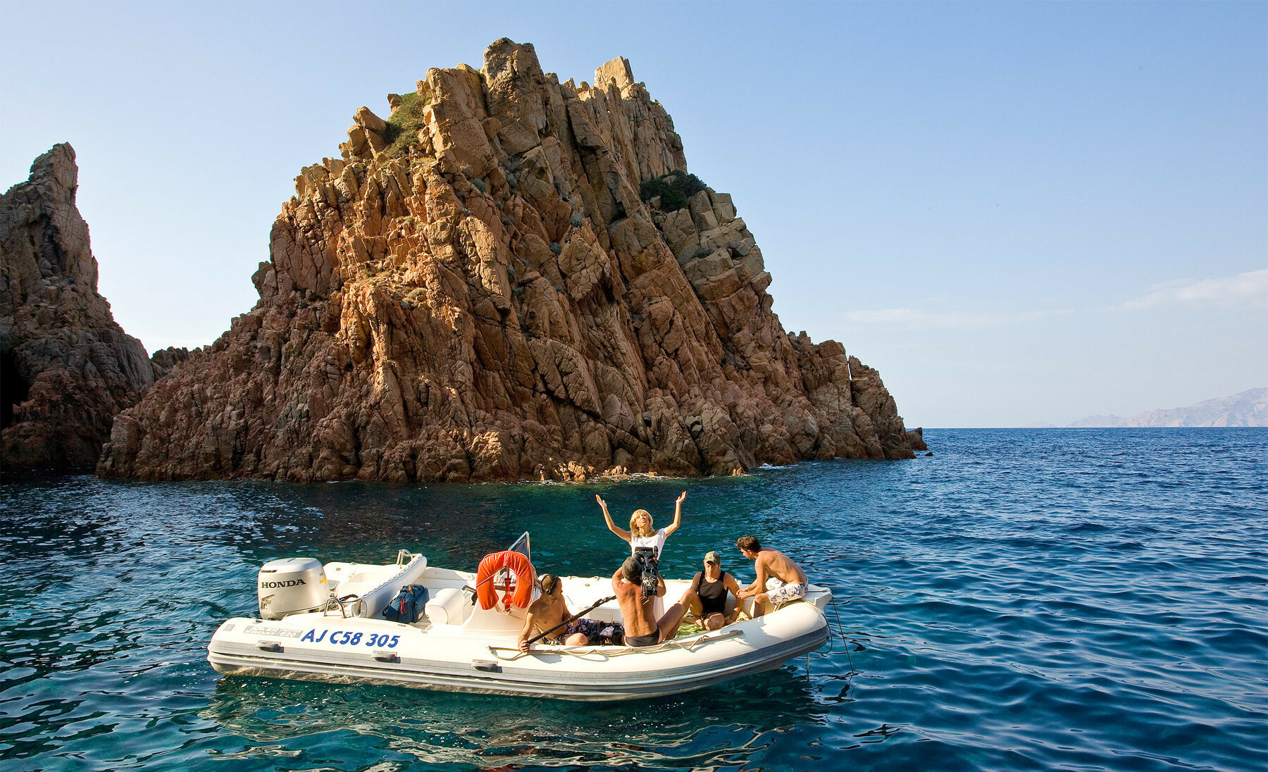 Tournage du film "Ludivine", de John B. Root